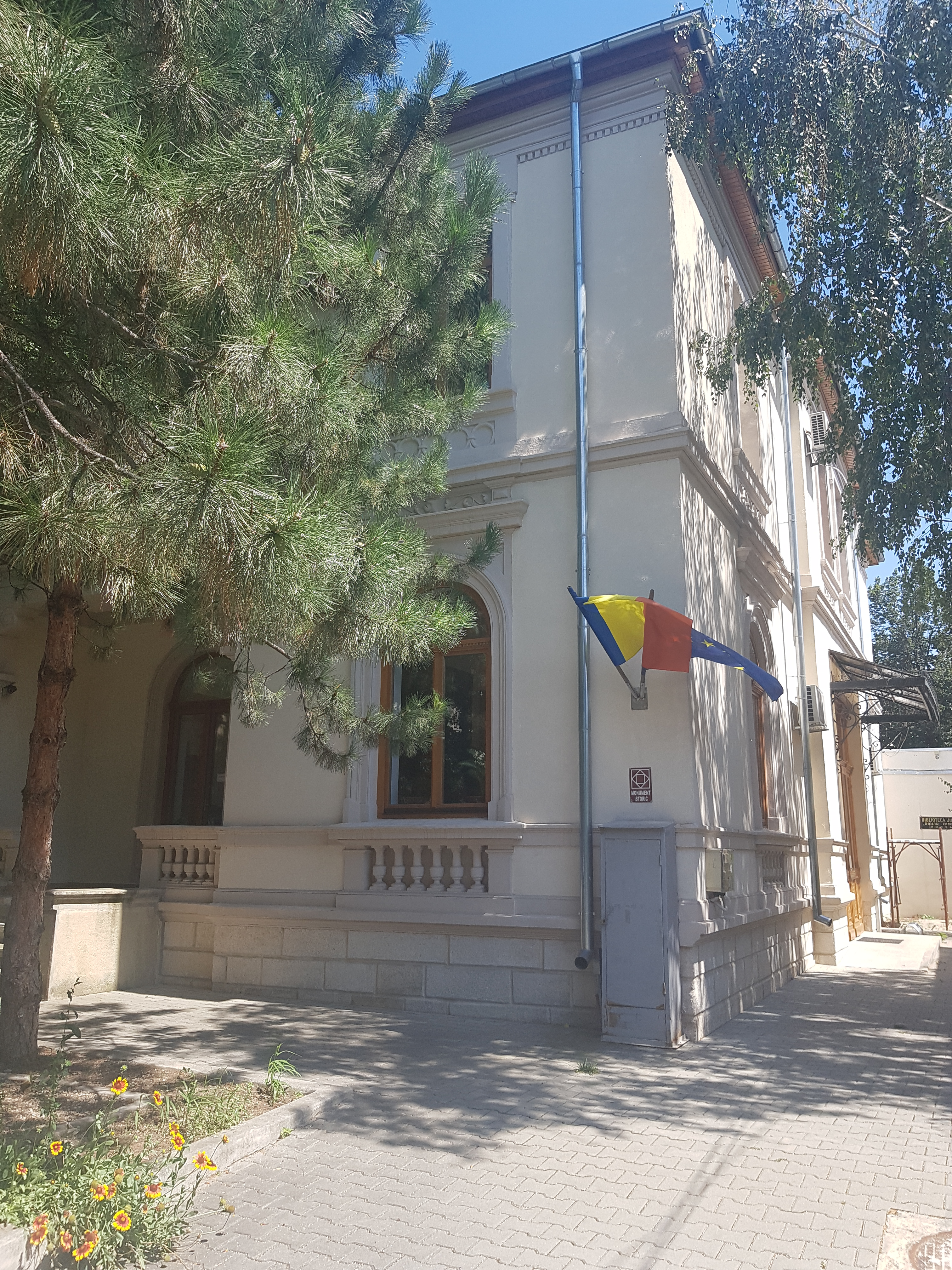 Casa dr. Blum